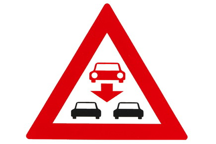 Österreichisches Gefahrenzeichen 14a.svg - Achtung Falschfahrer